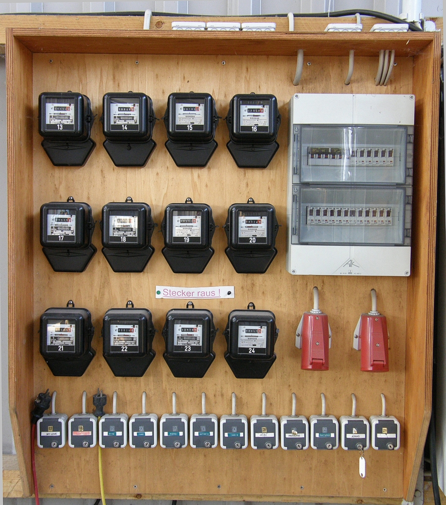 Eine große Anzahl von Stromzählern, zu der jeweils eine abschließbare Steckdose gehört